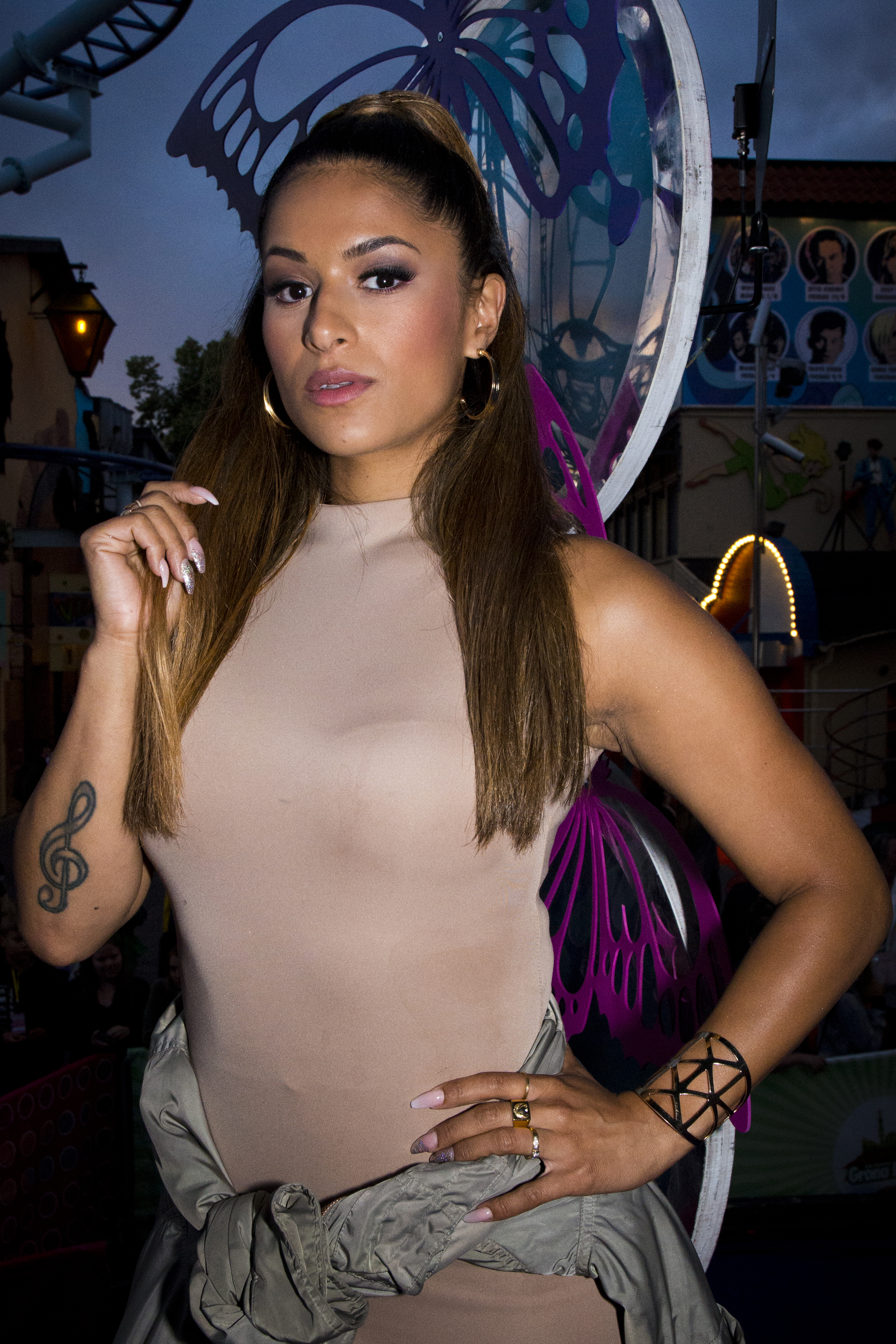 Linda Pira på Sommarkrysset, Gröna Lund